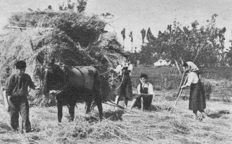 Mujeres ayudando en las labores del campo - Palencia - España Turística y Monumental / Cuarto álbum / Las Bellezas de Castilla / Región Leonesa - Cromo 70 x 50 Sepia